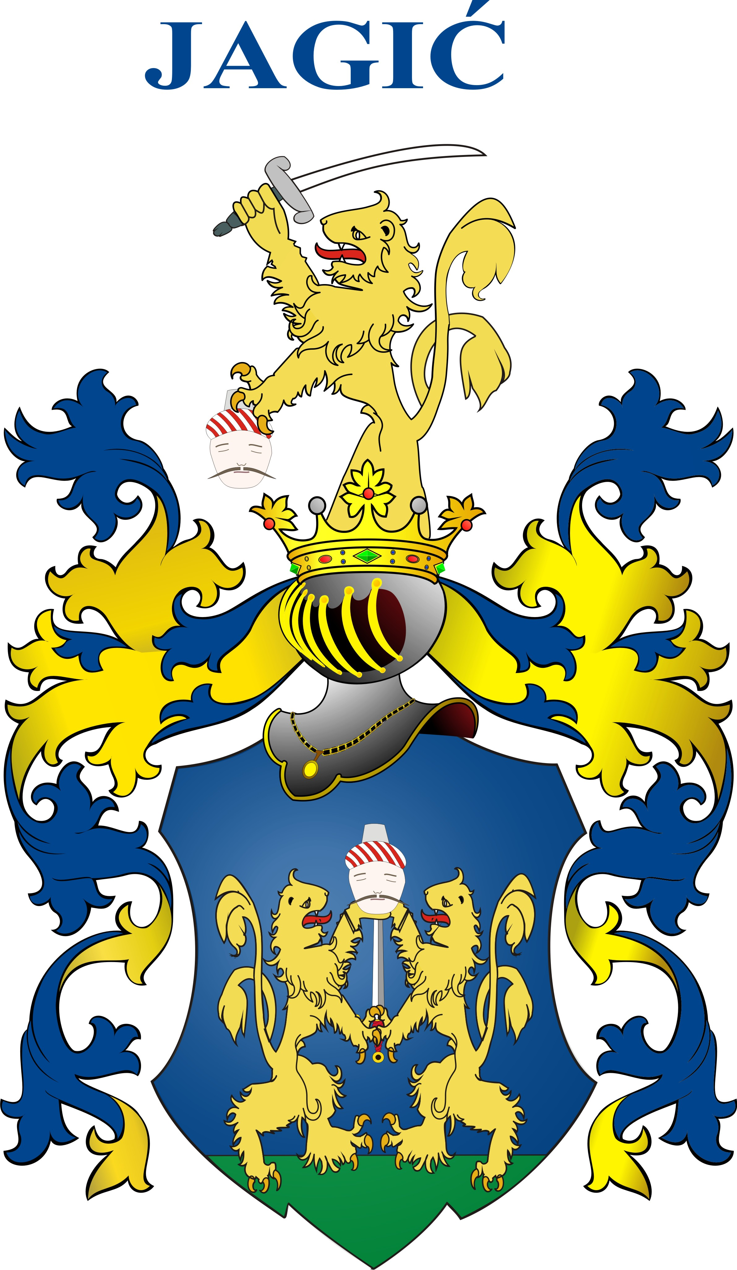 Grb obitelji Jagić iz 1569 godine